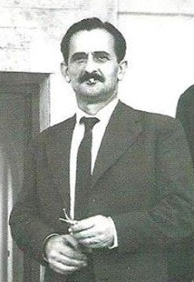 صورة تجمع ثلاثة من أعلام الأدب والثقافة التونسية جميعهم من مدينة القيروان وهم على اليمين الأستاذ إبراهيم شبوح حفظه الله وعلى اليسار الشاعر جعفر ماجد وفي الوسط يقف الأديب محمد الحليوي والمستعرب ريجيس بلاشير رحمهم الله.